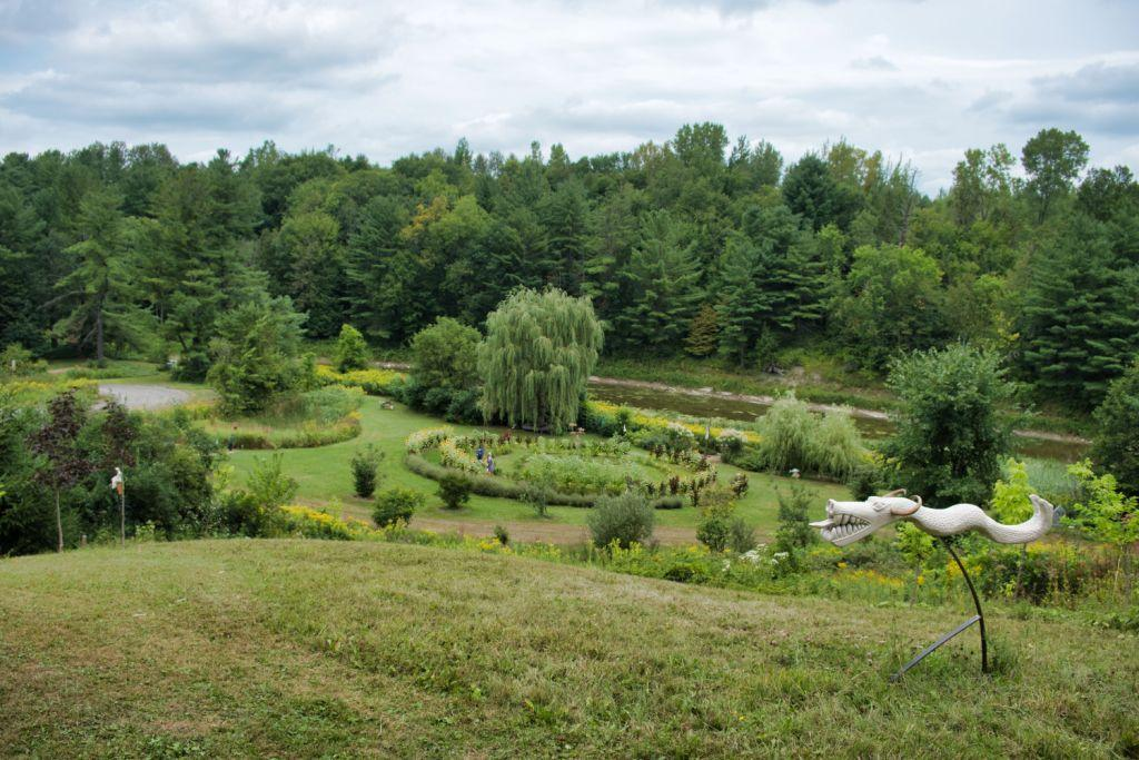 Ogród Moor'a w mieście Mascouche (Quebec)